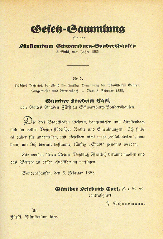 Urkunde zur Verleihung der Stadtrechte an Gehren, Langewiesen und Großbreitenbach in Thüringen aus dem Jahr 1855.